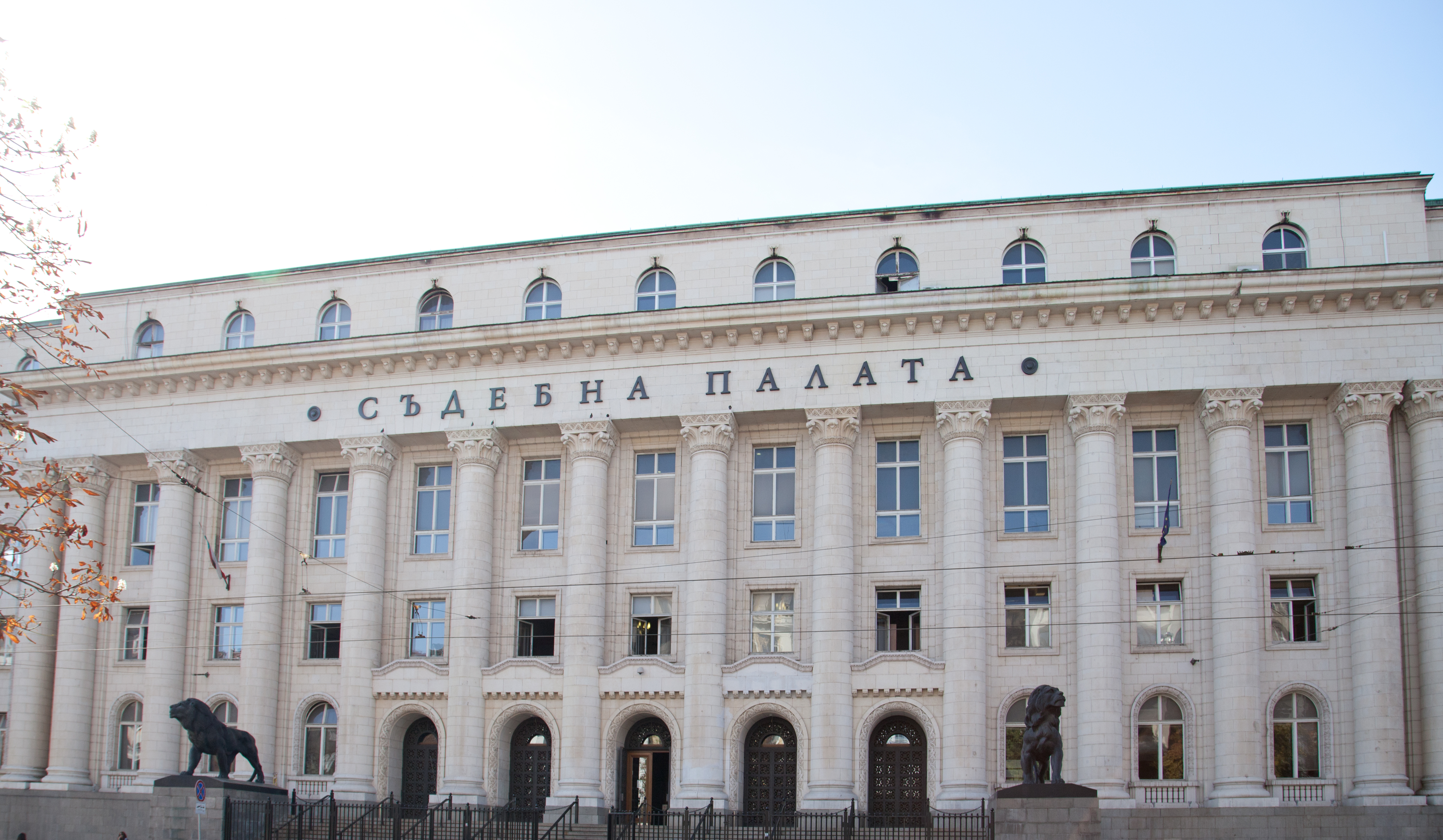 Sofia; Justizpalast